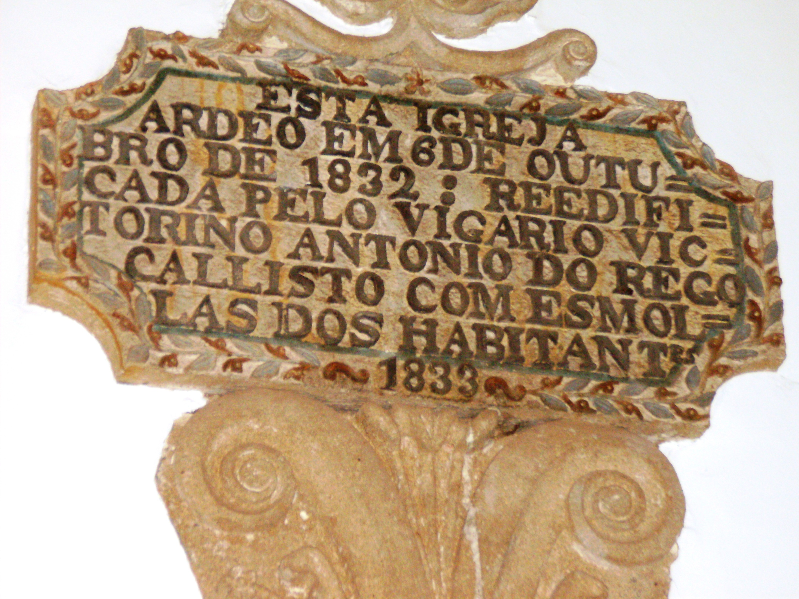 Igreja Matriz de Nossa Senhora da Assunção, Ilha de Santa Maria (Açores), Portugal.